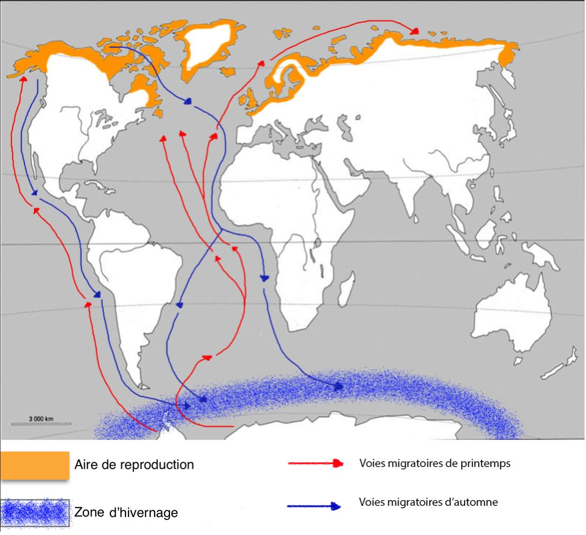 Trajet migratoire de la Sterne Arctique (Sterna paradisea)